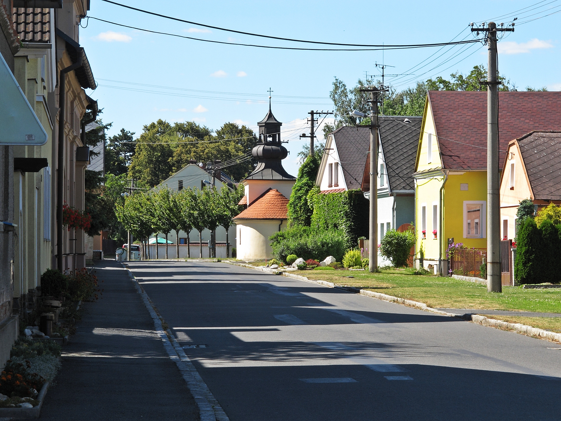 Kaple svatého Vendelína, Jantarová, u čp. 34, st. 43, Vávrovice.